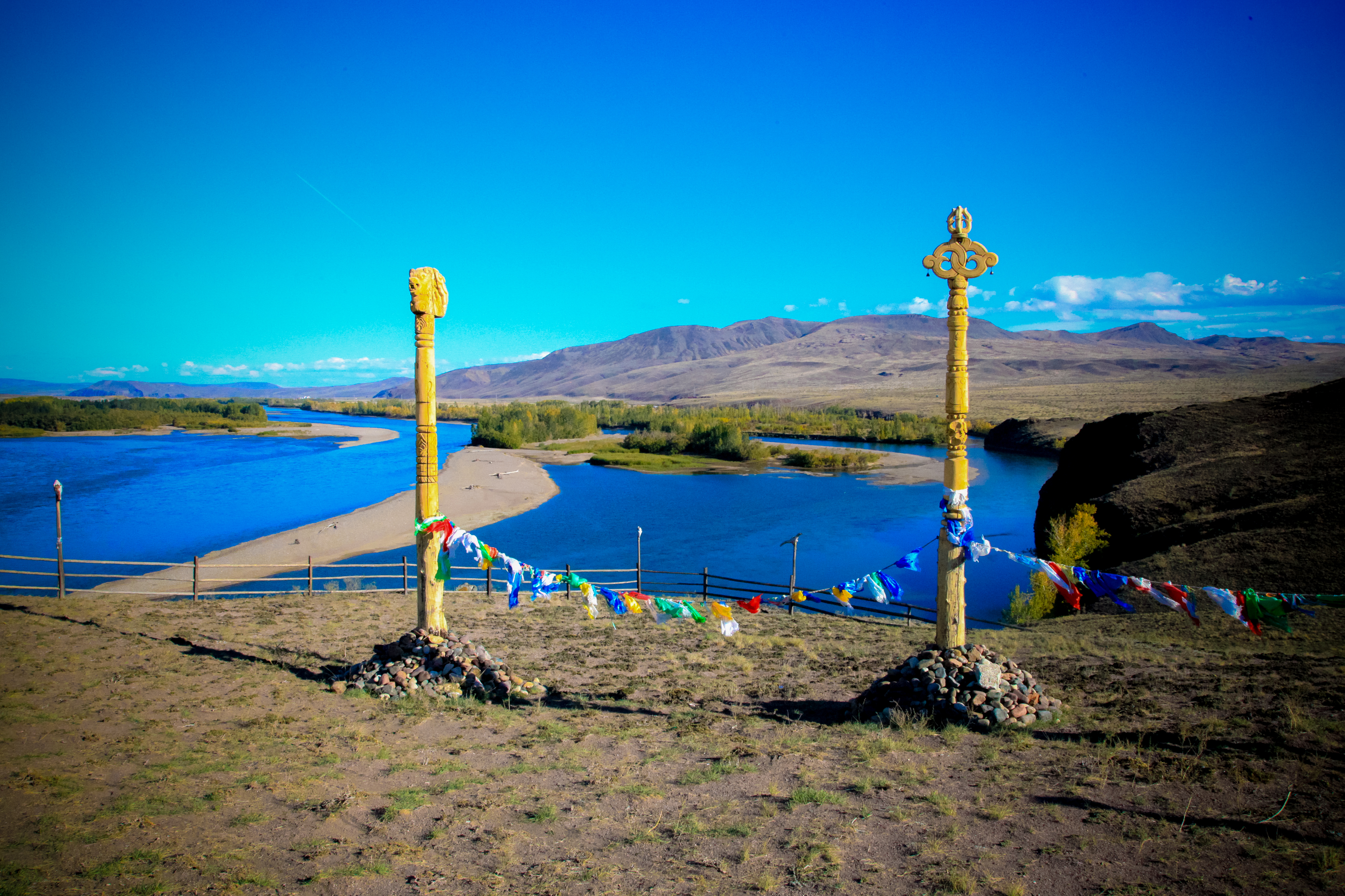 местечко "Алдын-Булак"